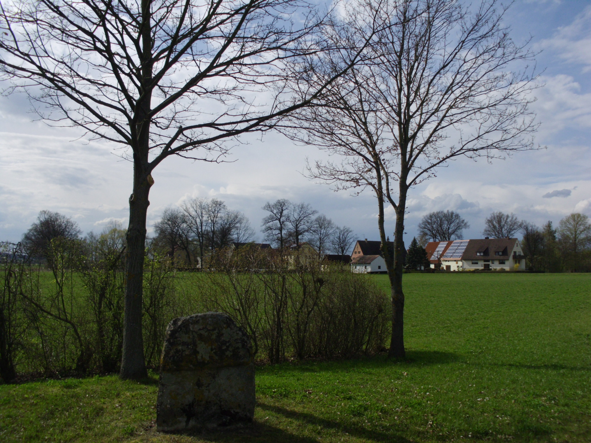 Sinderlach, Ortsteil von Gunzenhausen im mittelfränkischen Landkreis Weißenburg-Gunzenhausen, mit historischem Kreuzstein im Vordergrund